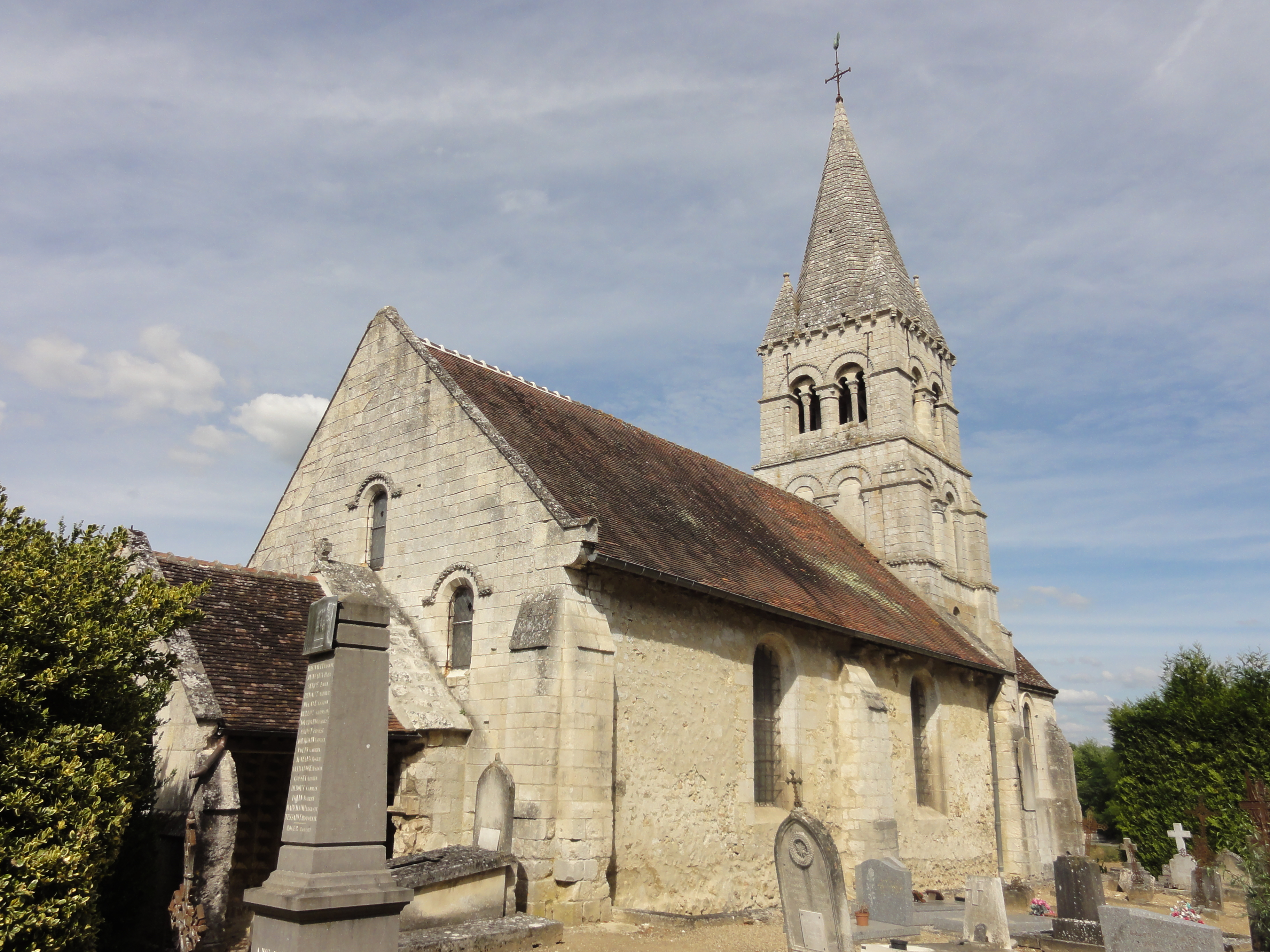 Église Saint-Vaast de Saint-Vaast-de-Longmont (voir titre).